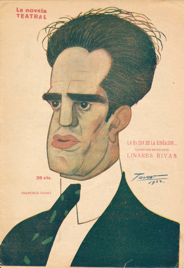 Caricatura de Francisco Pierrá.